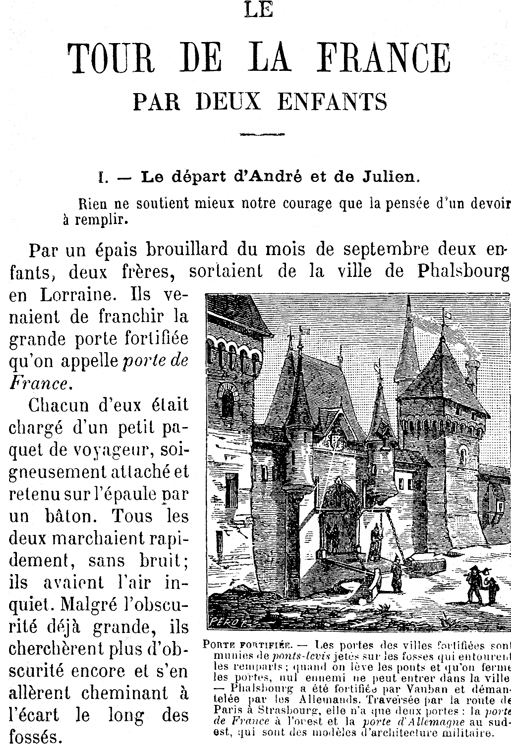 First page of Le Tour de la France par deux enfants, by G. Bruno (1833-1923)